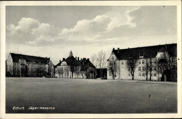 Jaeger Kaserne Erfurt, 1939